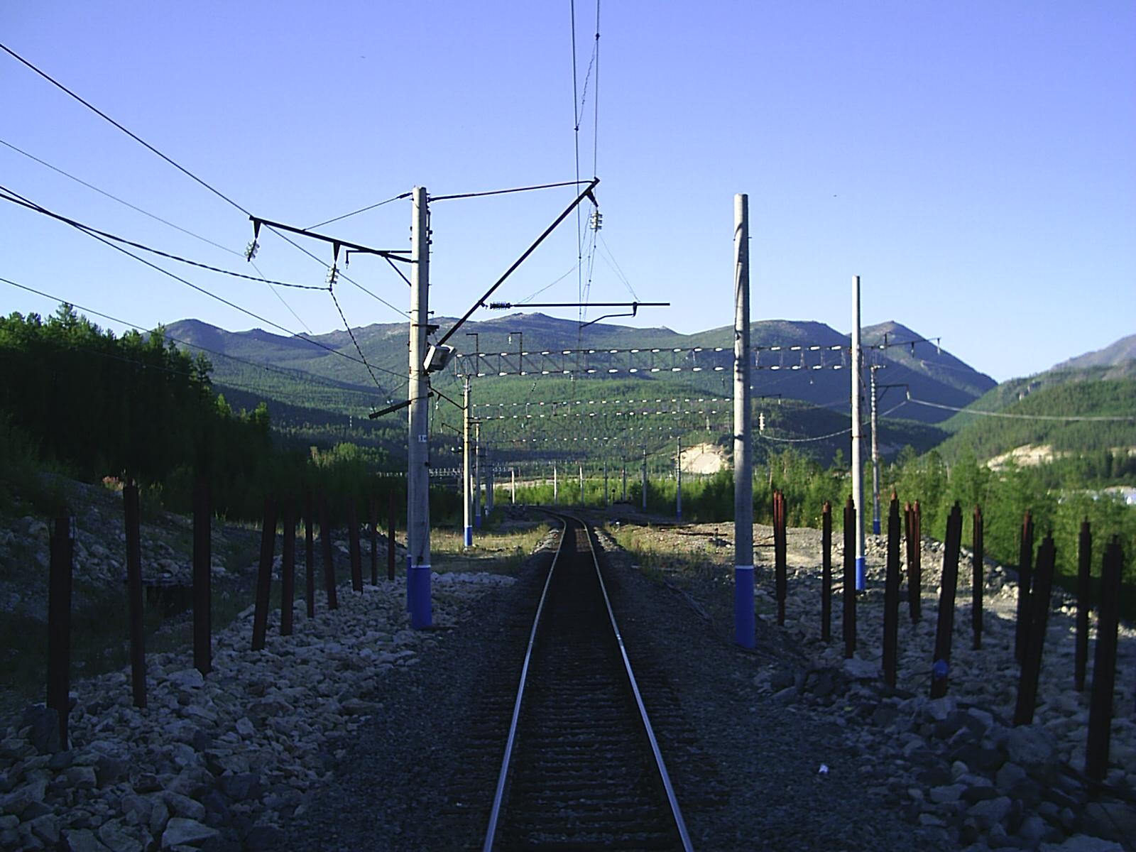 Снимки августа 2006 г. Разъезд Казанкан на БАМе